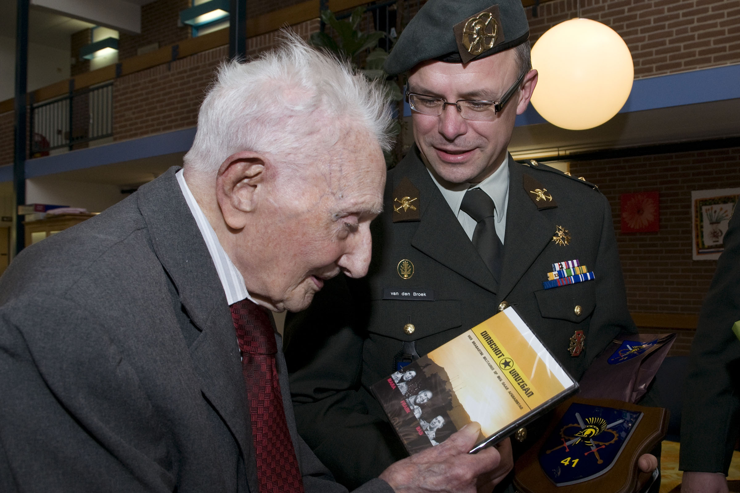 Mede namens de minister, de staatssecretaris en de Commandant der Strijdkrachten bracht luitenant-kolonel Ed van den Broek van 13 Gemechaniseerde Brigade in Oirschot, samen met een van zijn militairen, een verjaardagsbezoek aan Van Eijkeren. De militairen namen als cadeau een bloemetje en de dvd-box Oirschot-Uruzgan mee voor de jarige.